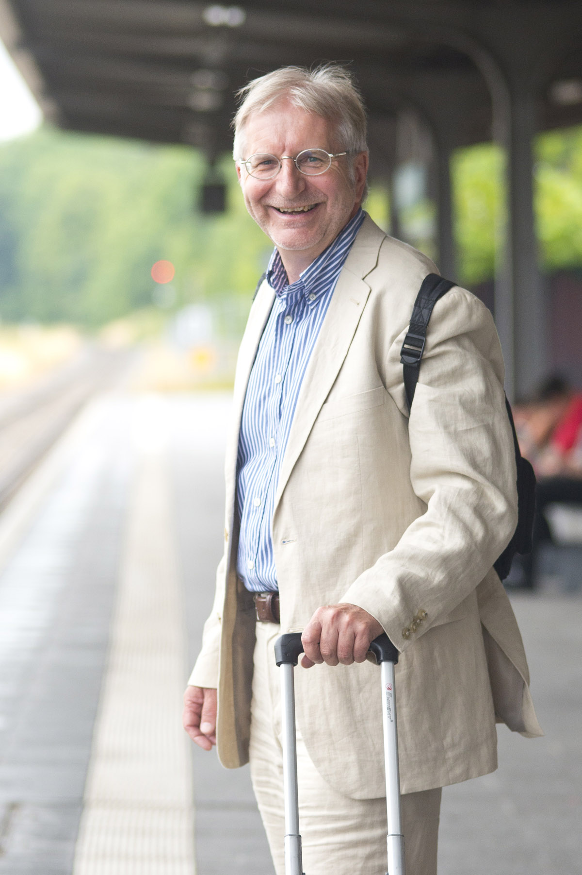 Pierre Stutz, christlicher Autor und Spiritualitäts-Meister